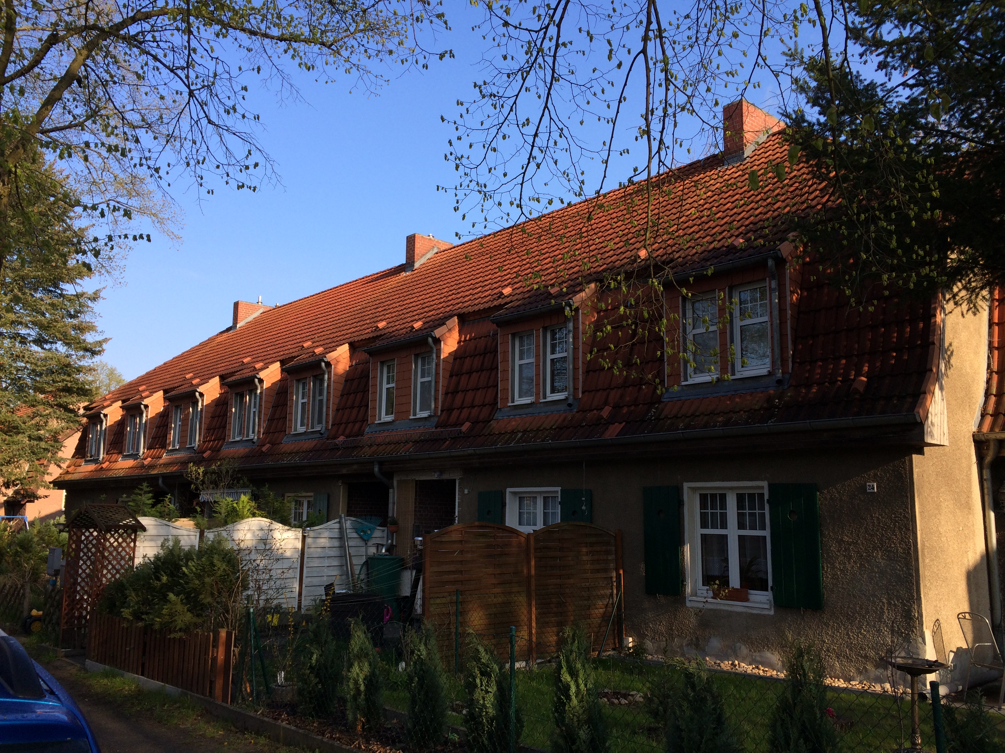 Ehemaliges Pflegerdorf der Nervenklinik in der Waldstraße in Teupitz